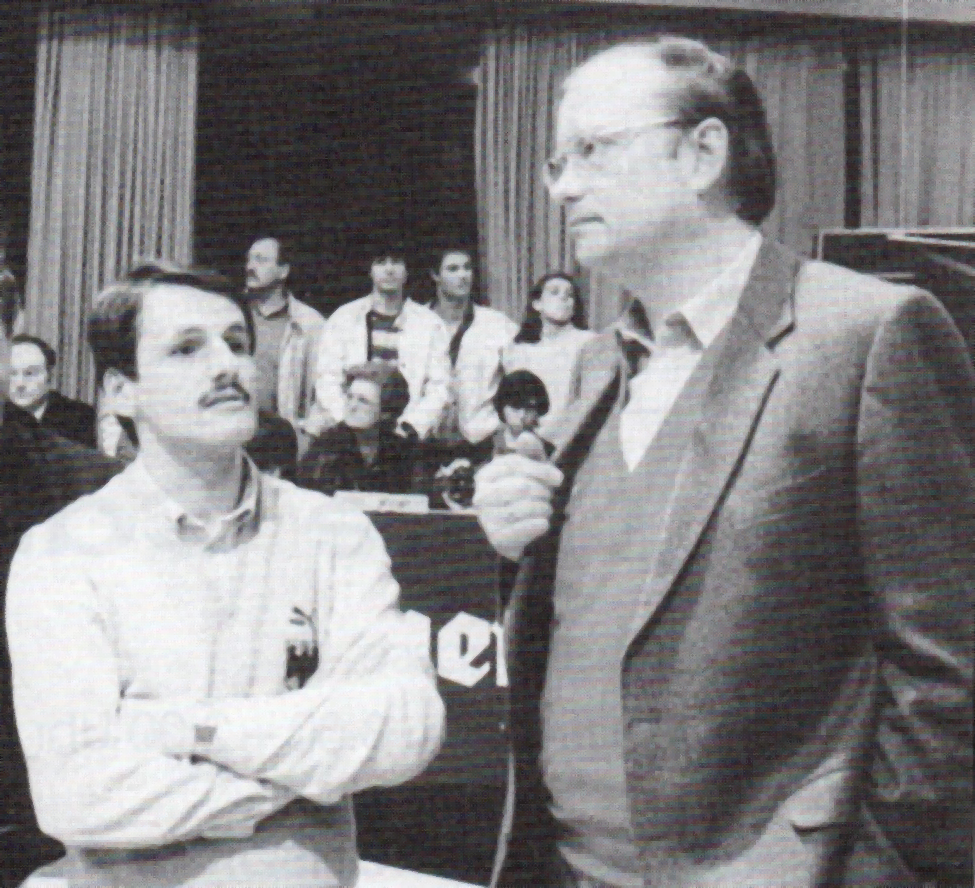 Klaus Hose, deutscher Karambolagespieler, Autor, Billardtrainer